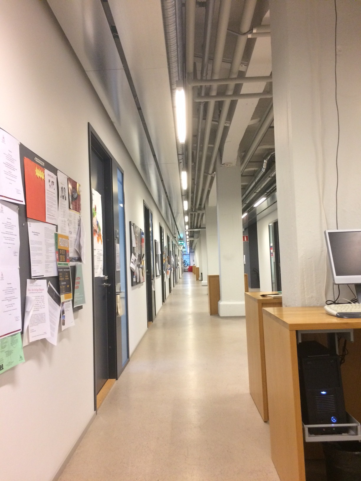 Flur Institut Germanistik Arken Åbo Akadmie